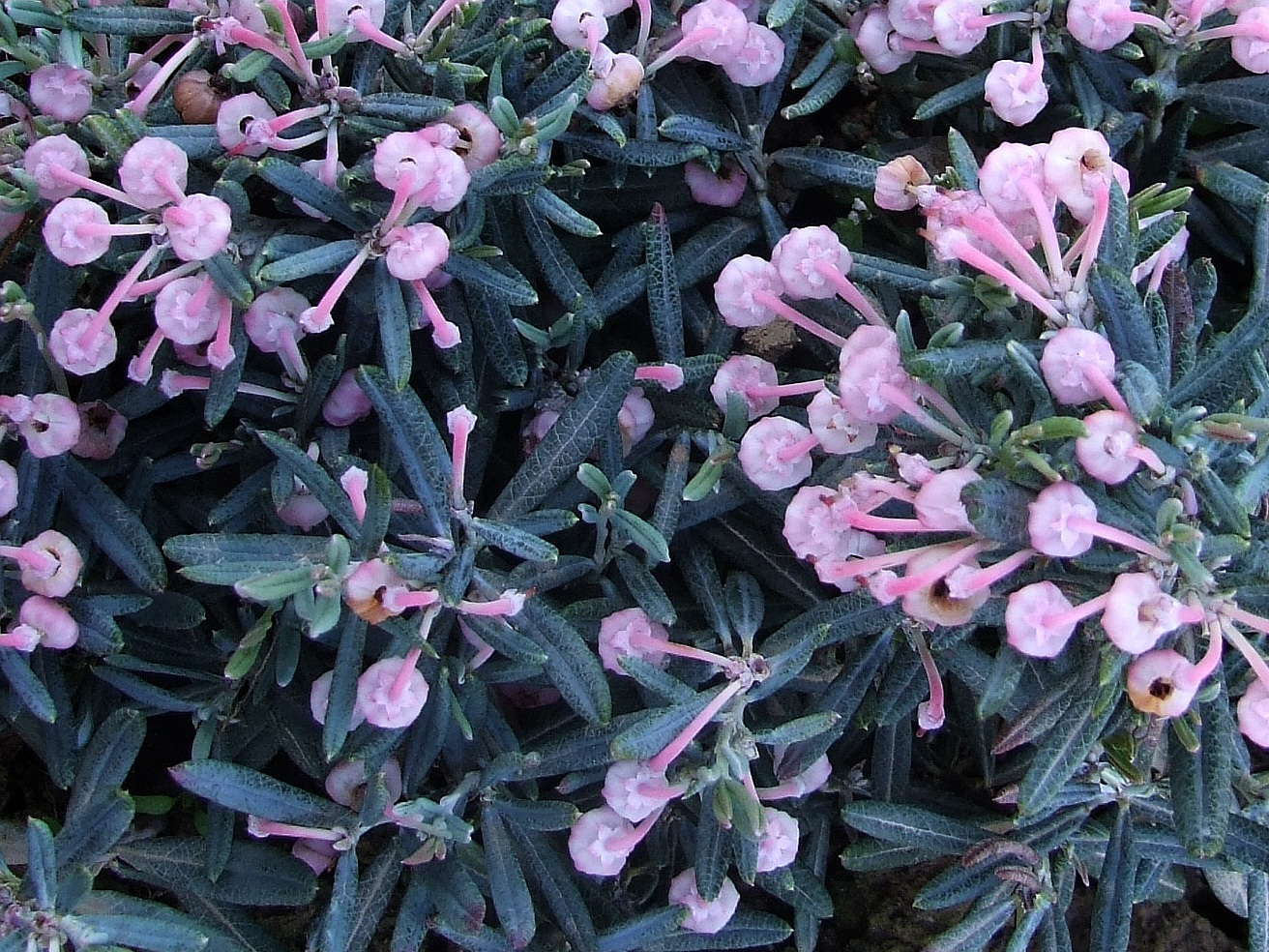 Andromeda polifolia Cultivar 'Compacta'